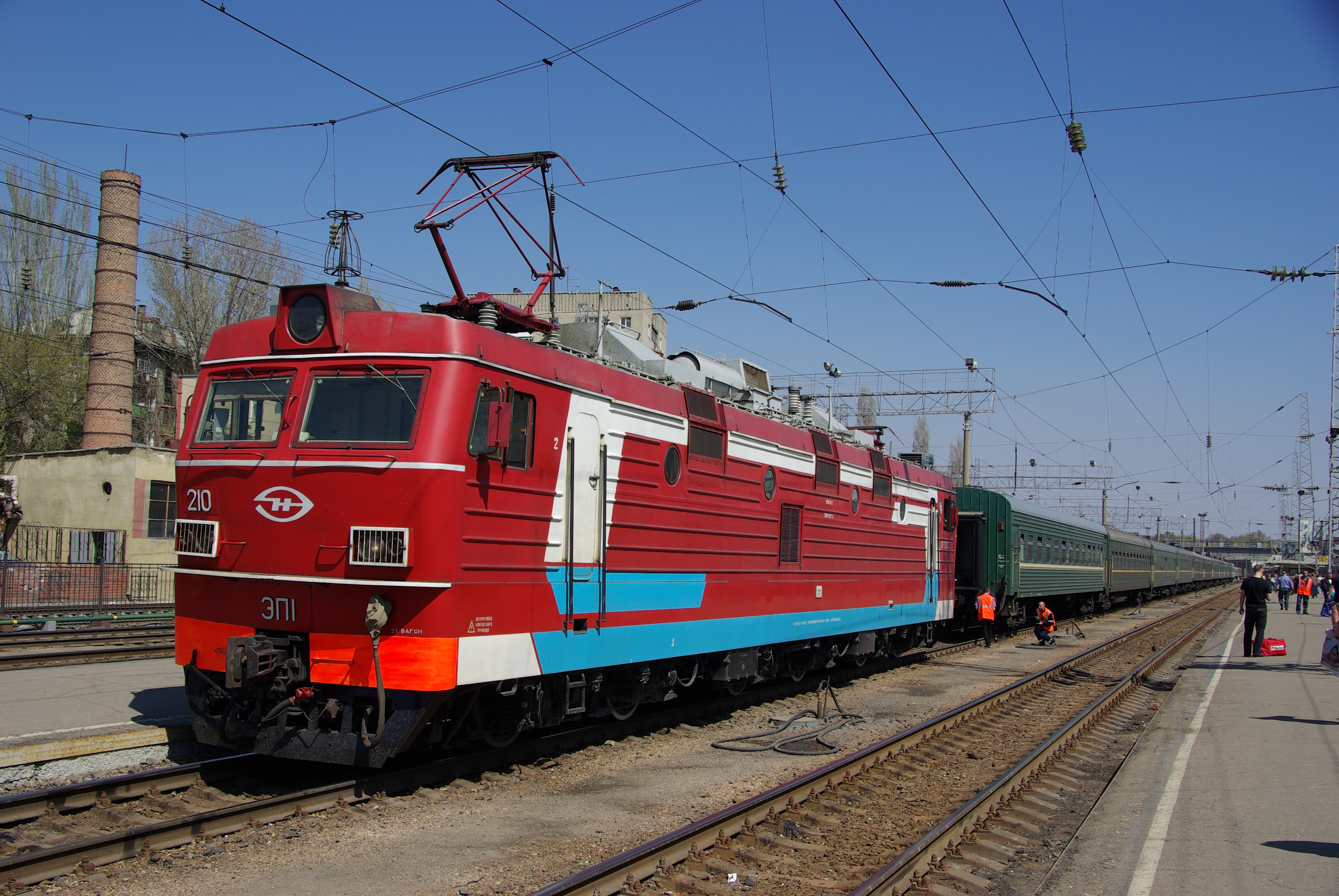 РЖД Электровоз ЭП1-210 на станции Саратов. Приехал на нём из Москвы.